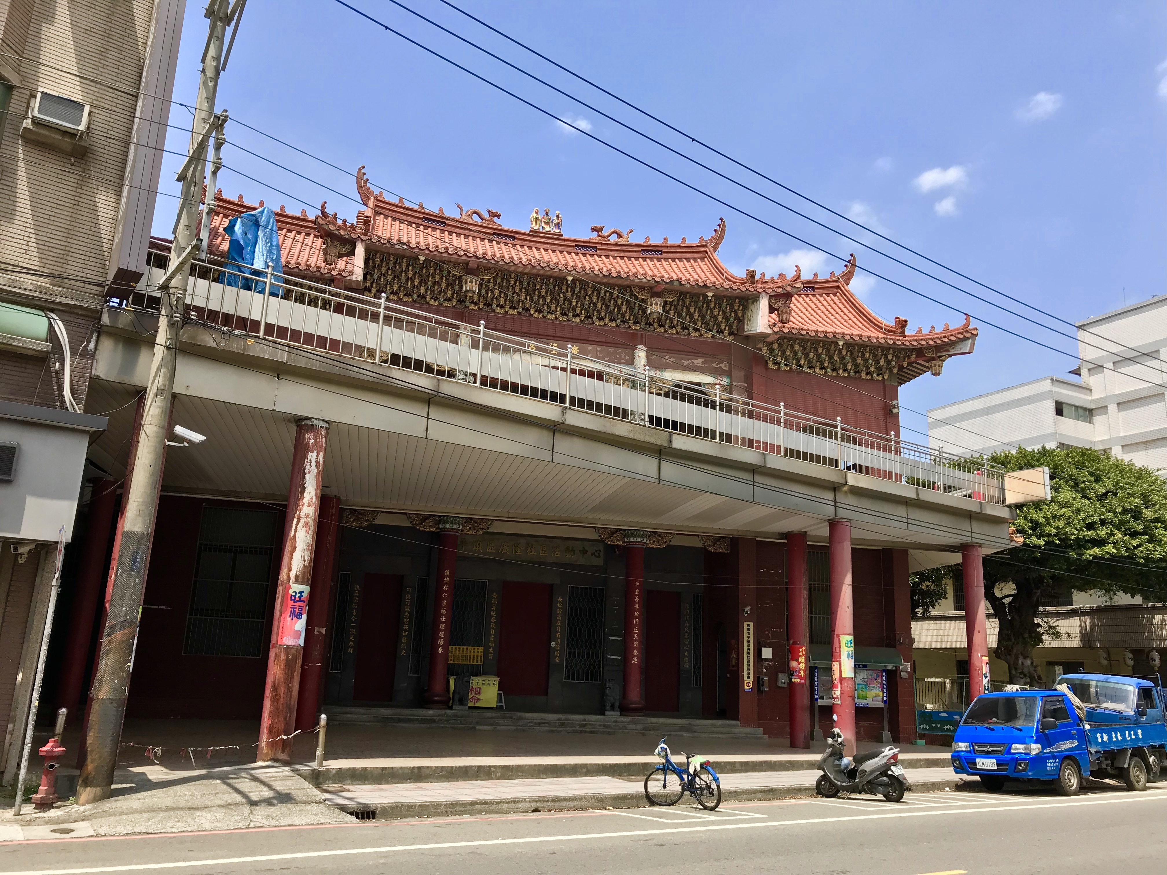 中文（台灣）: 平鎮廣隆宮